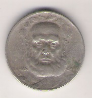 Uma moeda de 100 Réis cunhada em 1936. Pode-se ler Tamandaré This PNG graphic was created with GIMP.